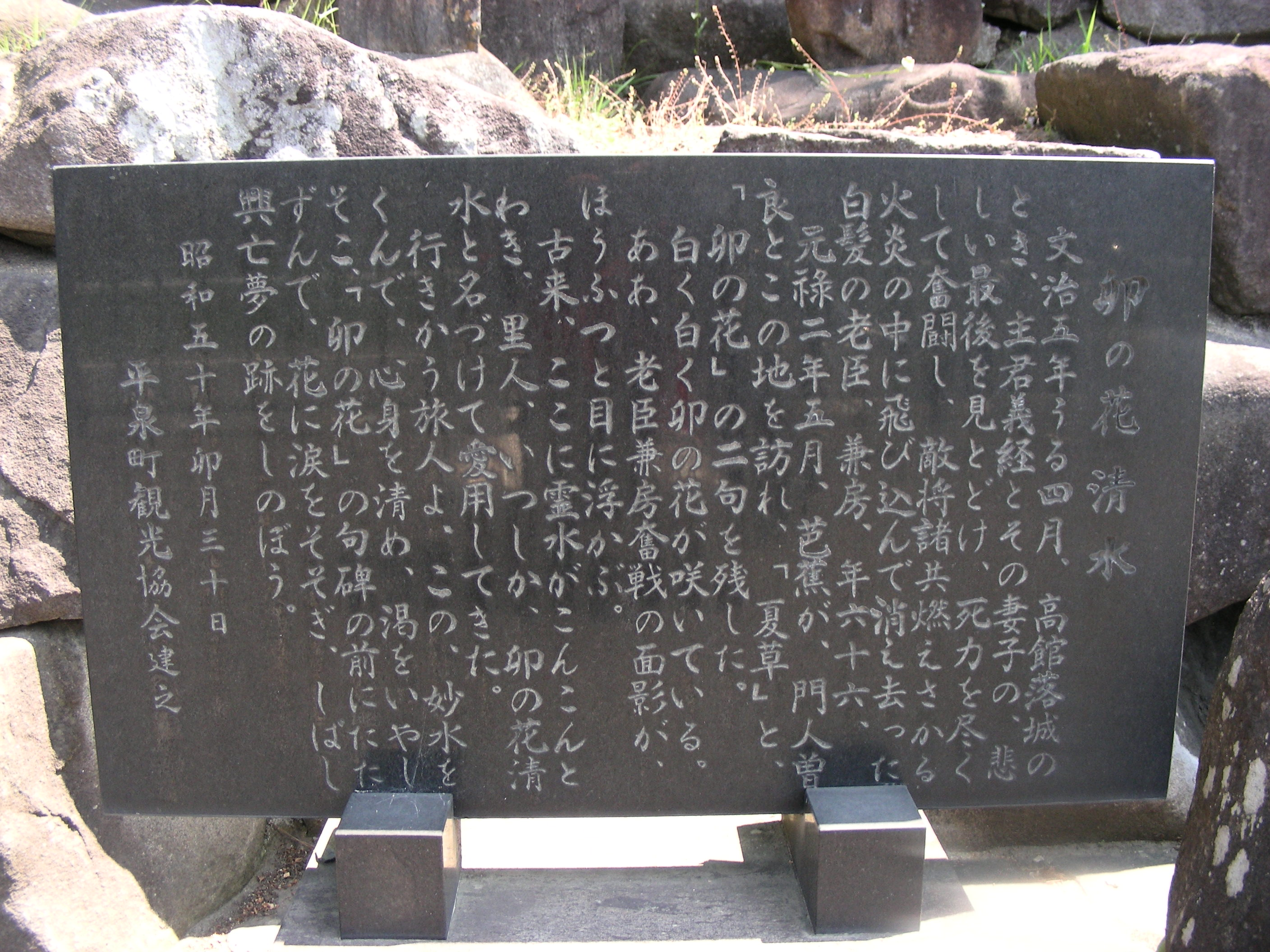 岩手県平泉町高舘義経堂に上る山道麓にある芭蕉の句碑。2008年6月9日撮影